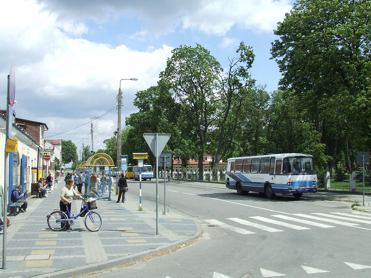 Kozienice, dworzec PKS przy rynku